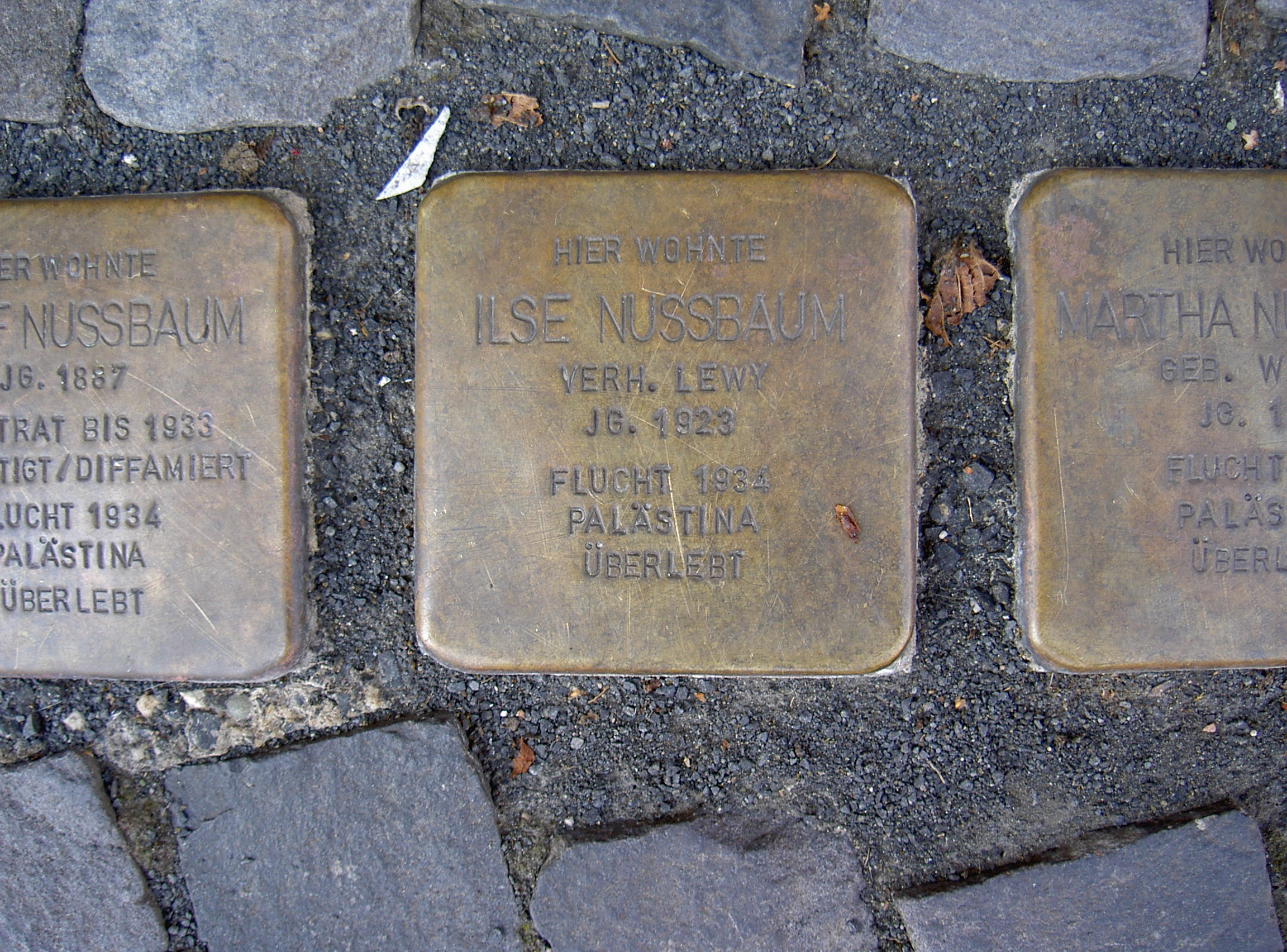 Stolpersteine in Vacha Ilse Nussbaum